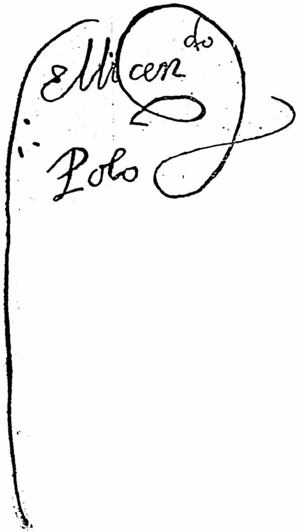 Firma del cronista Polo de Ondegardo